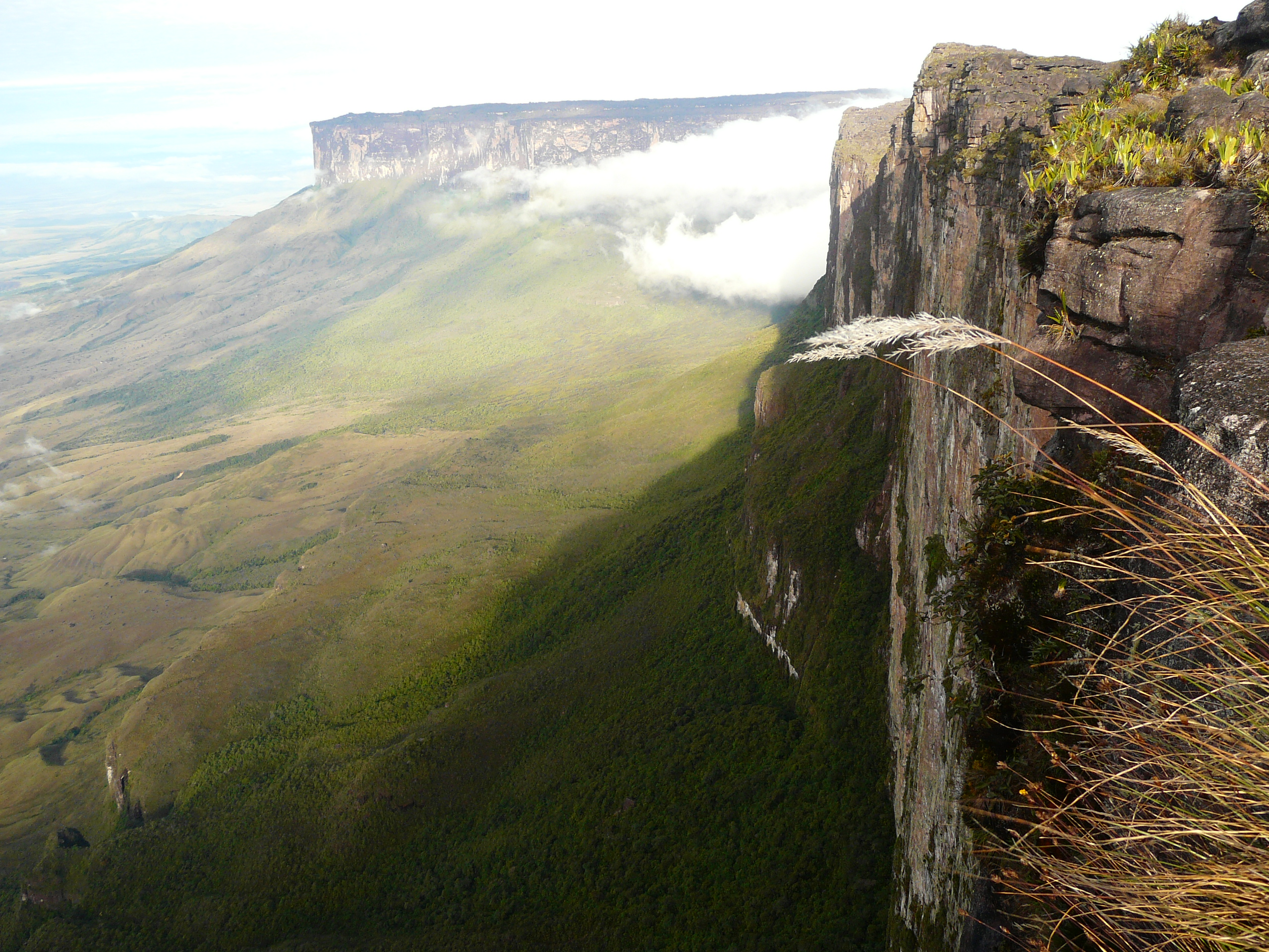 Paredão